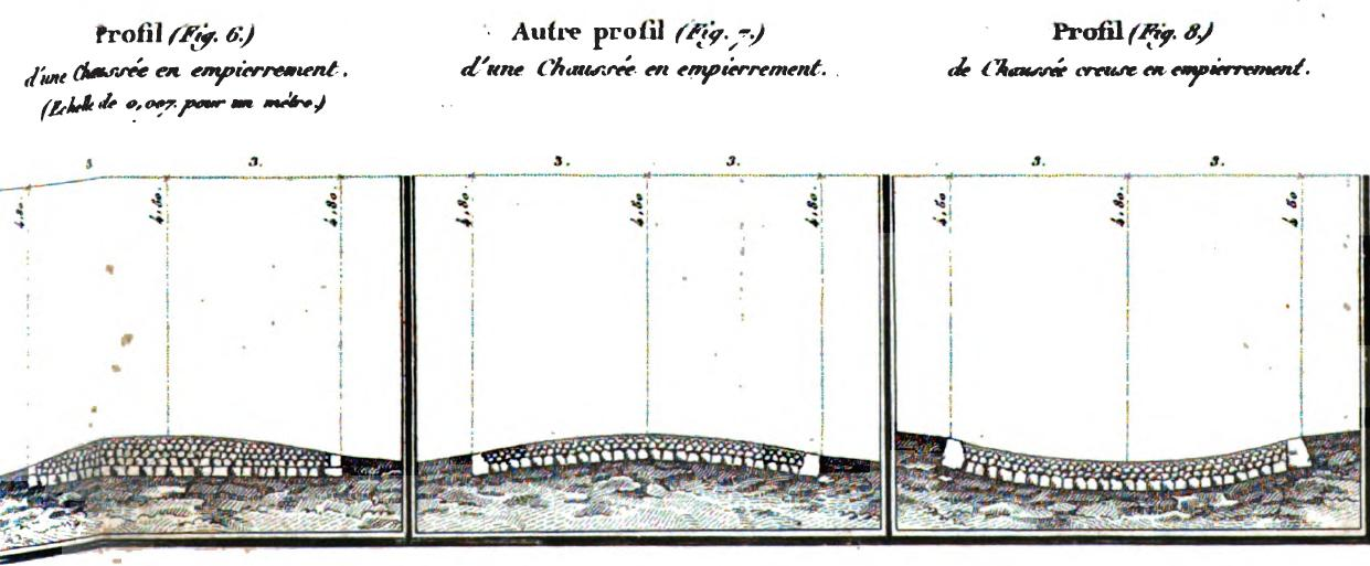 Technique d’empierrement des chaussées selon Tresaguet